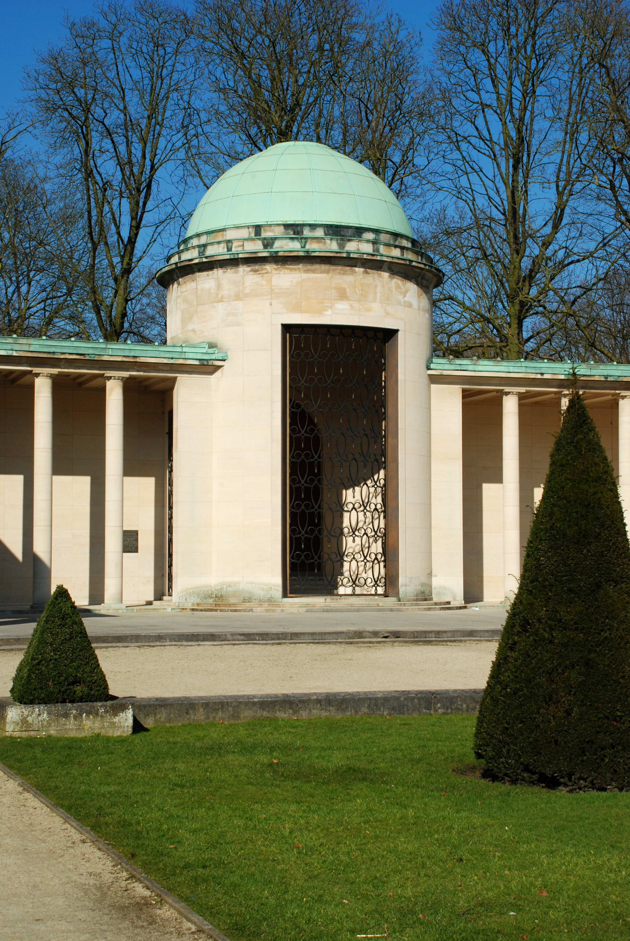 Belgique - Bruxelles - Mémorial Reine Astrid (Architecture monumentale - architecte Paul Bonduelle - 1938)